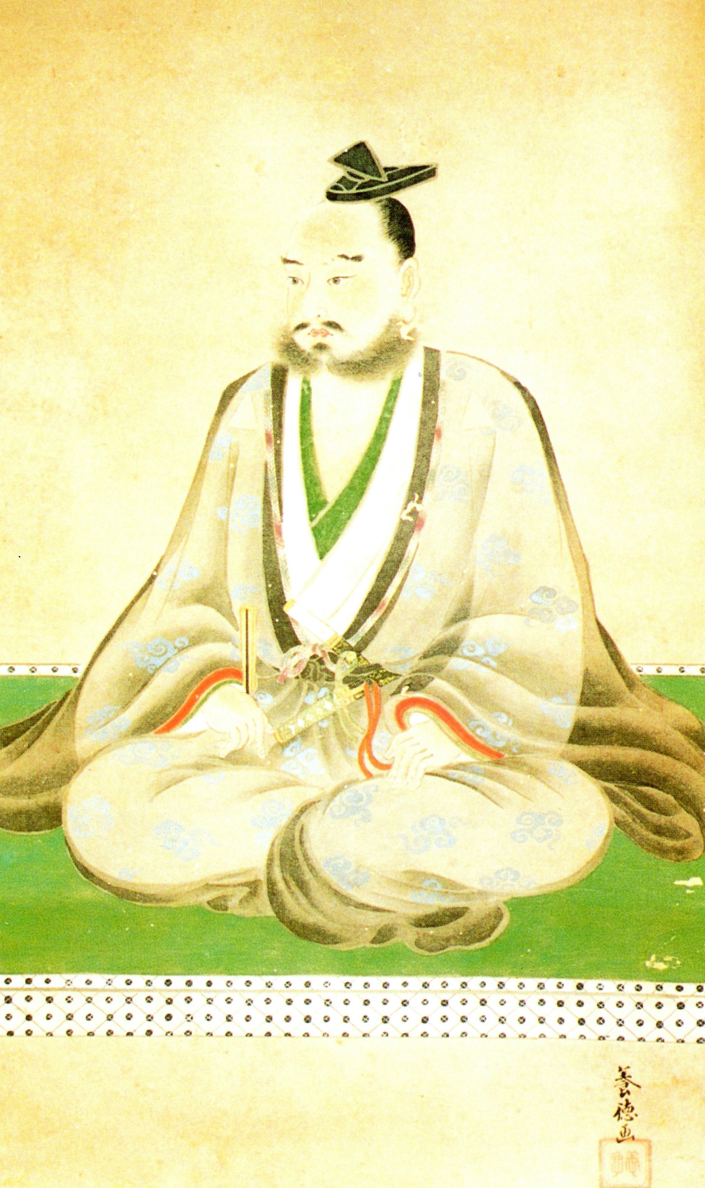 伊東祐兵の肖像。